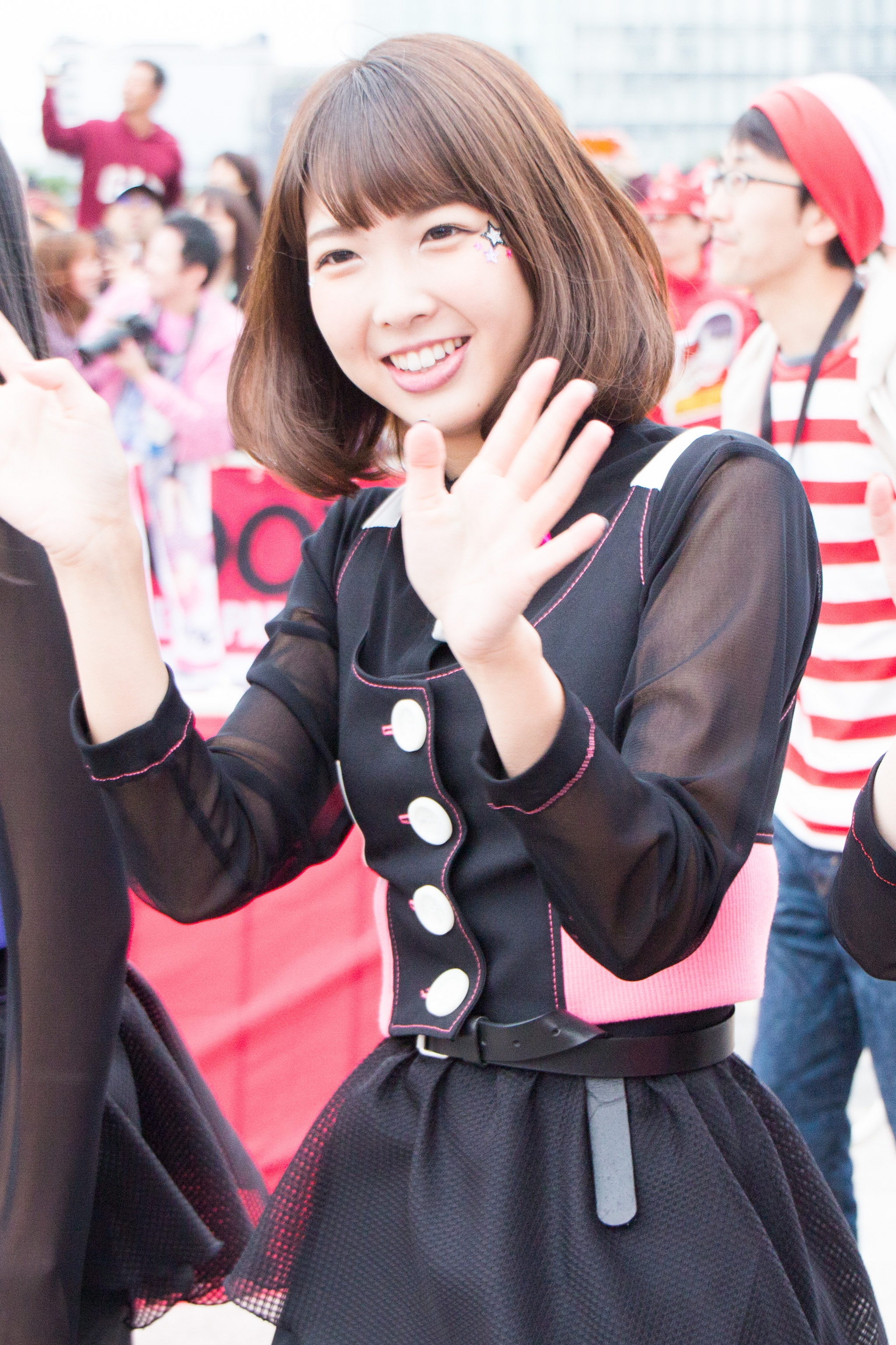 T-SPOOK 2016 西田望見 (ワルキューレ)